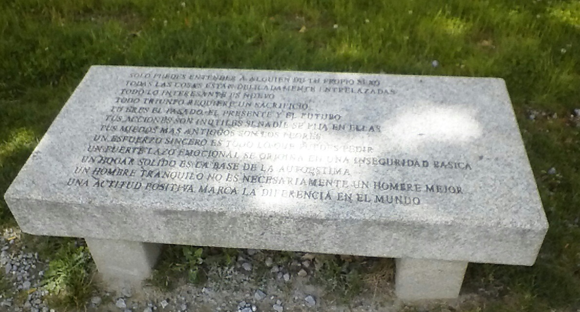 Escultura contemporánea Banco de Jenny Holzer, Parque de la Isla de las Esculturas, Pontevedra Capital